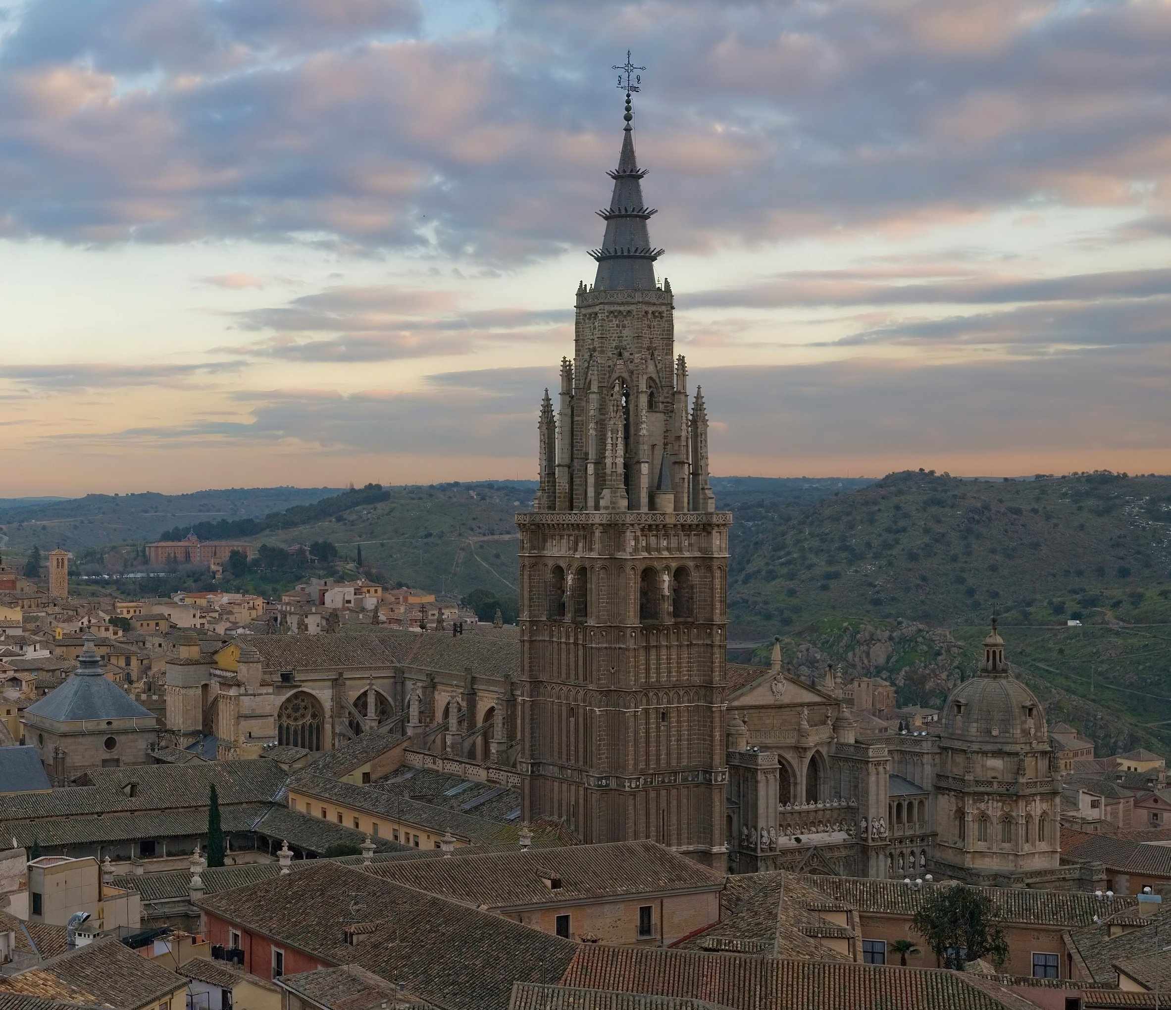 קתדרלת טולדו